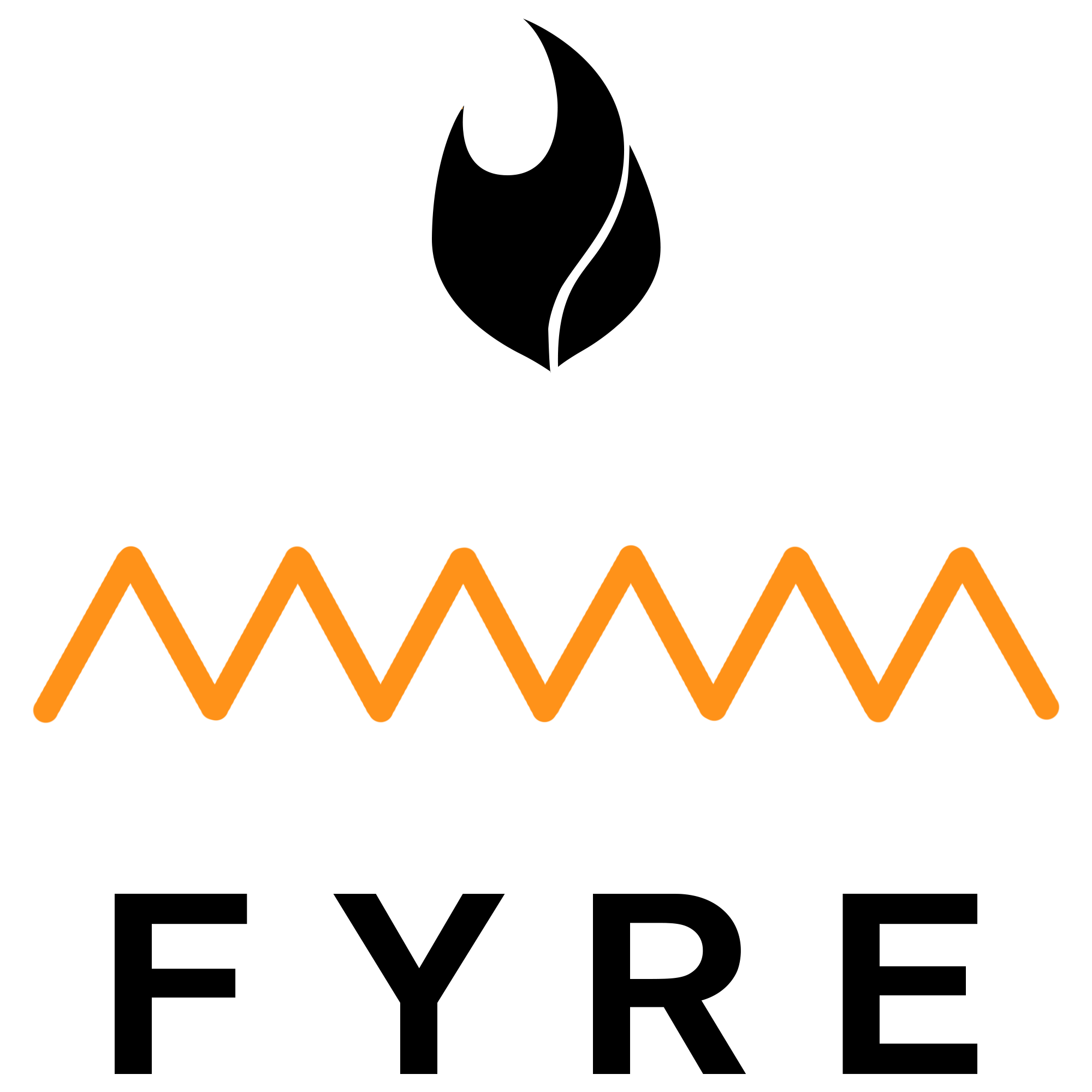 Logo del Fyre Festival